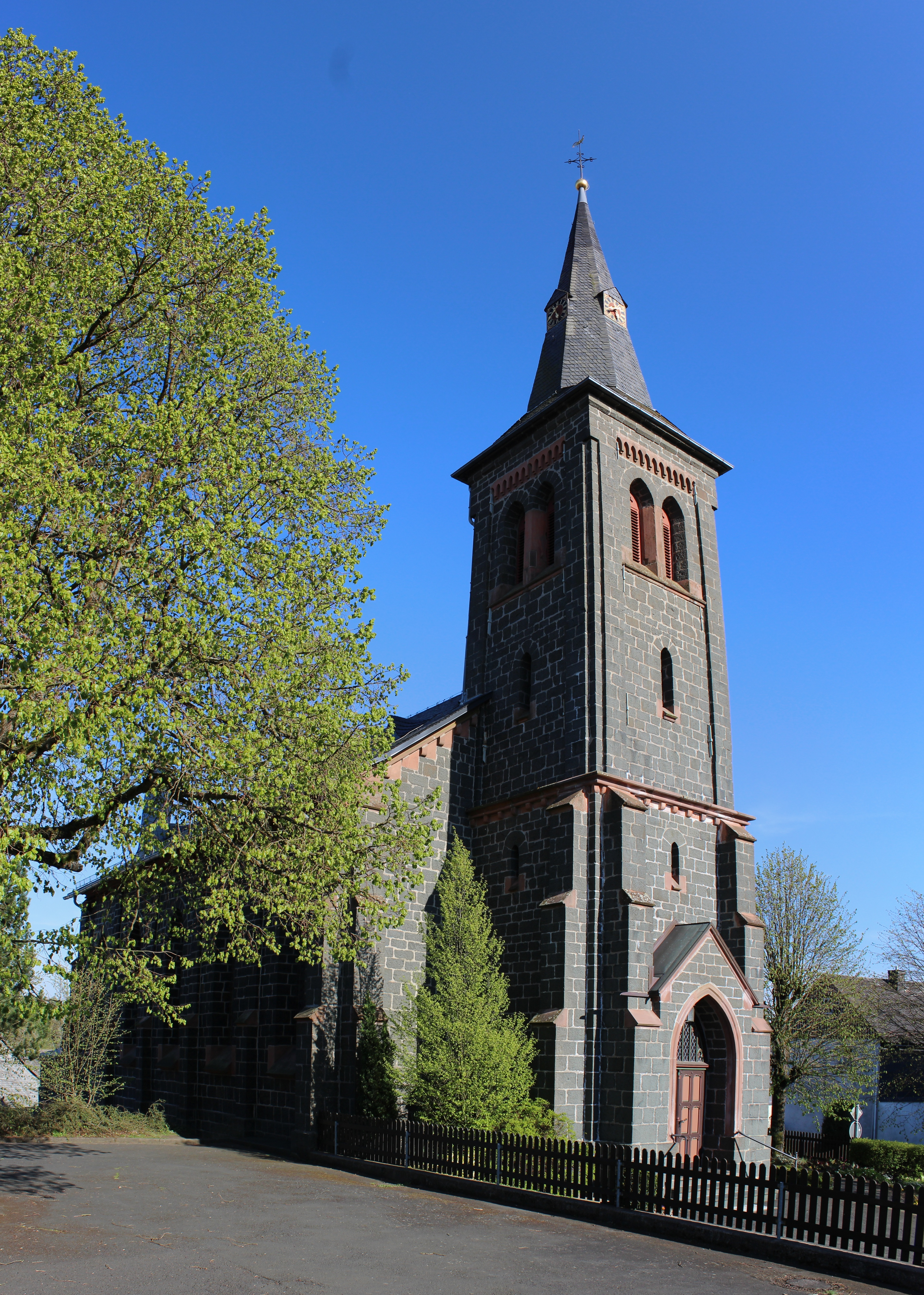 Ev- Kirche